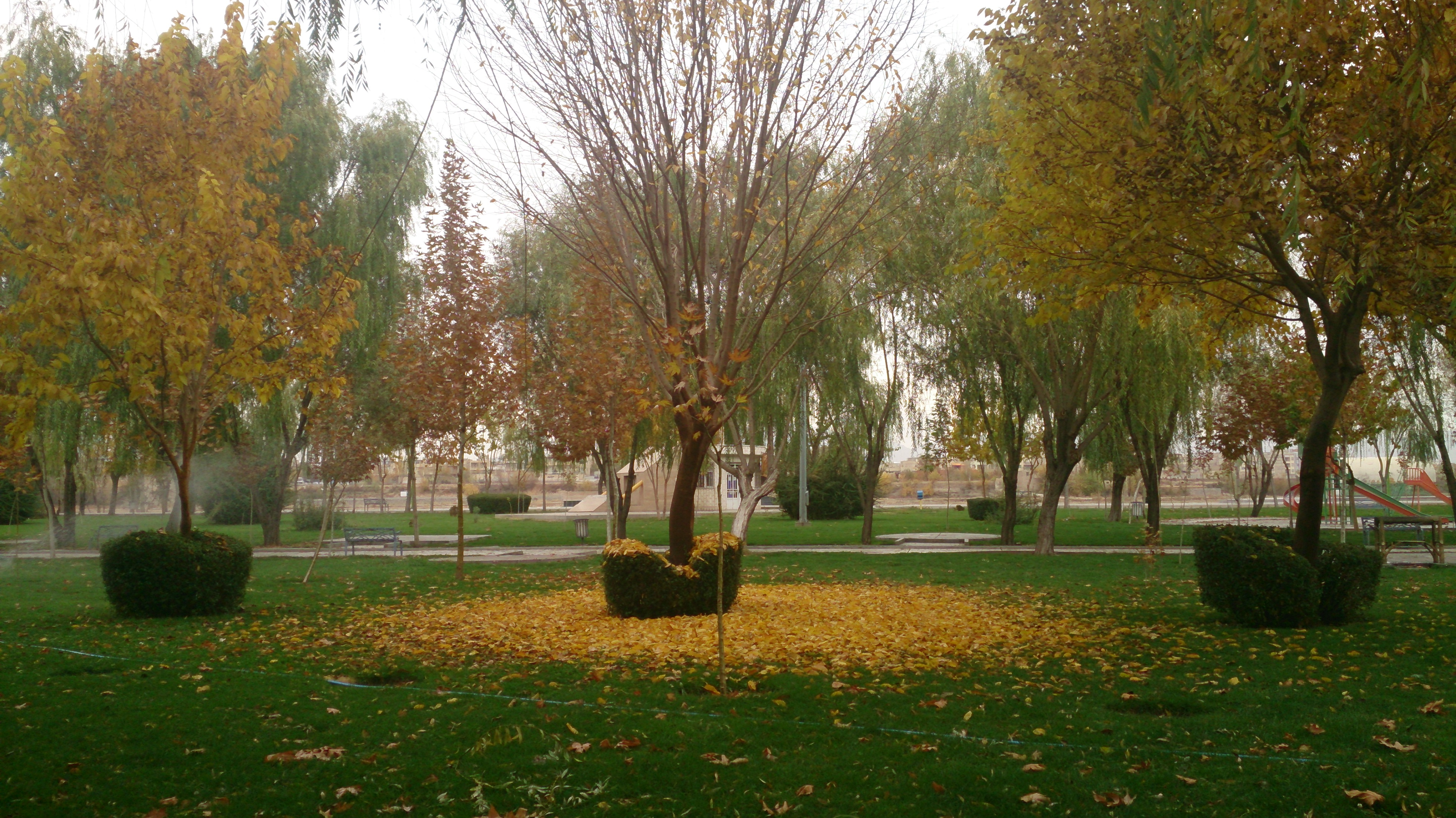 نمایی پاییزی از پارک ساحلی زرین شهر